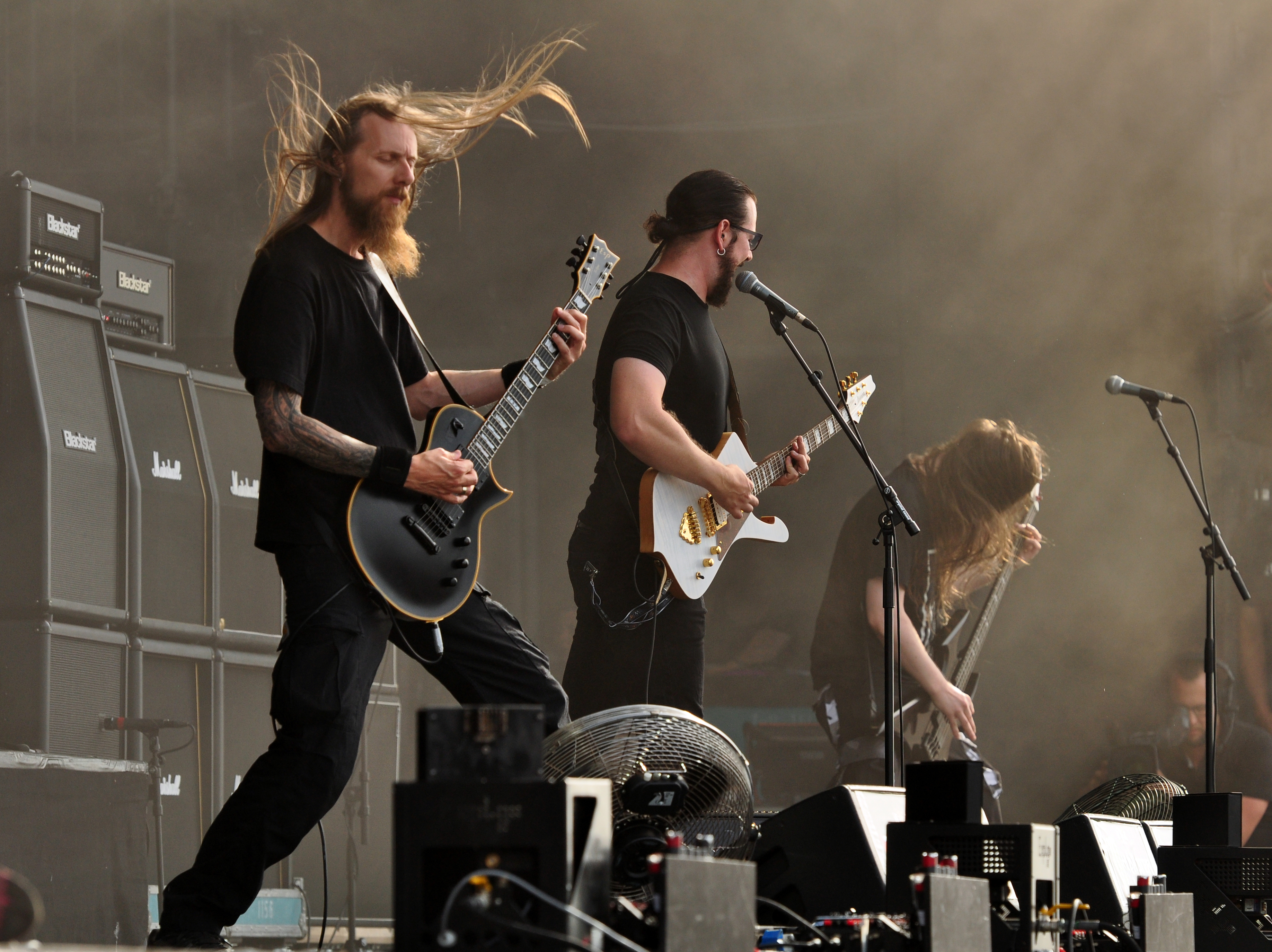 02-08-2014-Emperor at Wacken Open Air 2014-JonasR 02